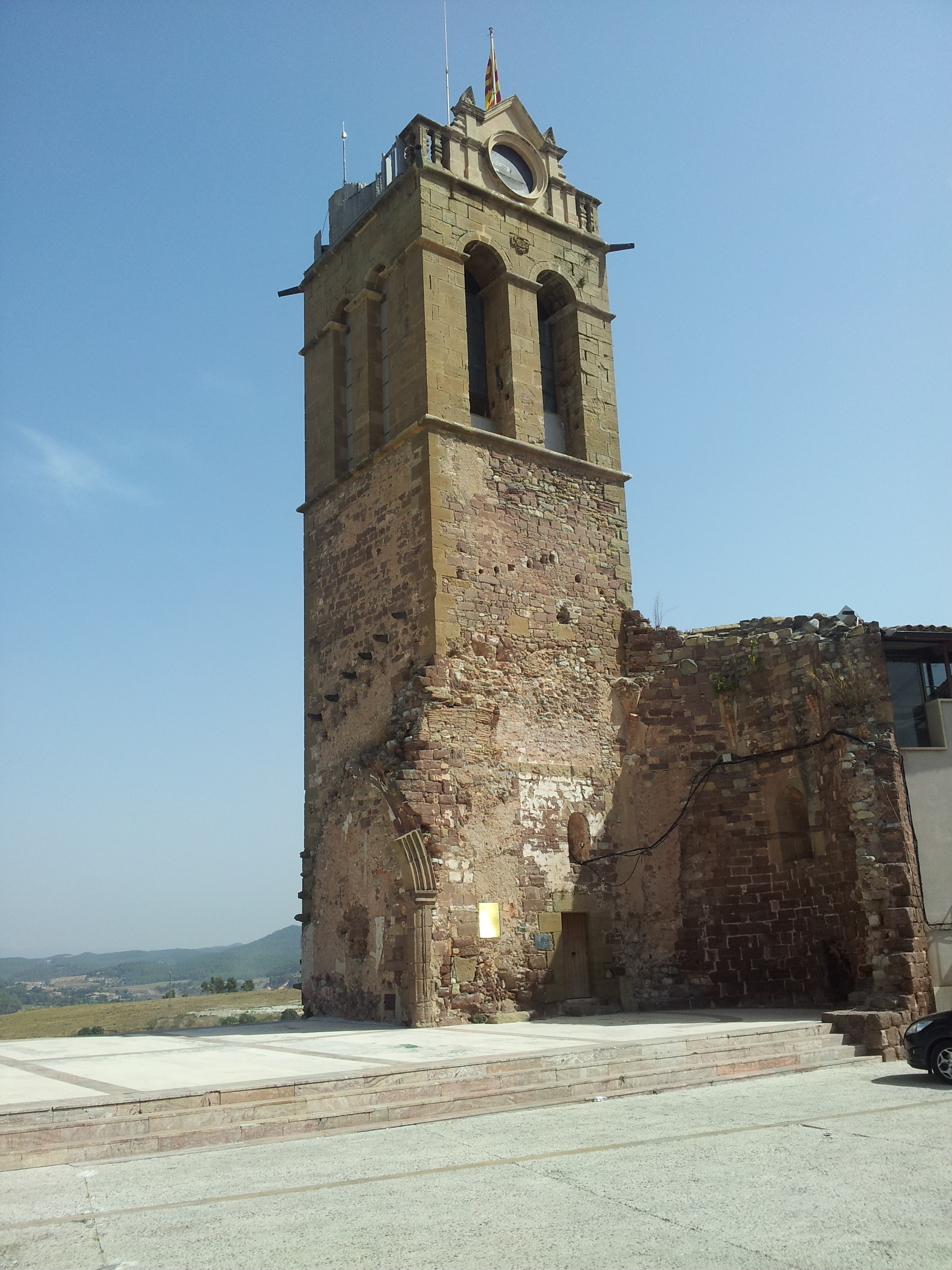 Castell romànic, gòtic, segles XII - XV